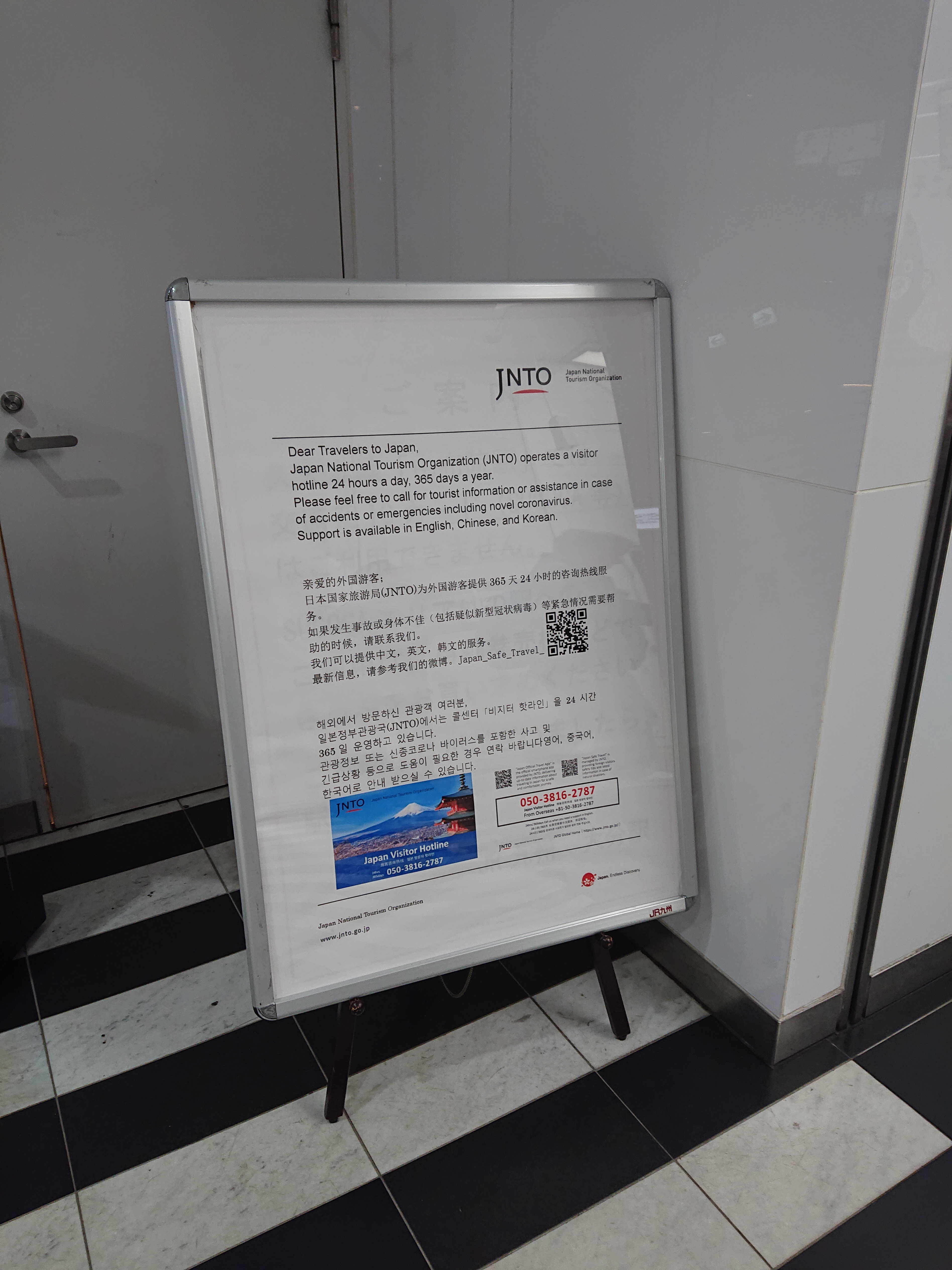 JR大分駅にて、3か国語で書かれた、コロナウイルス関連の訪日観光客向けコールセンターの案内